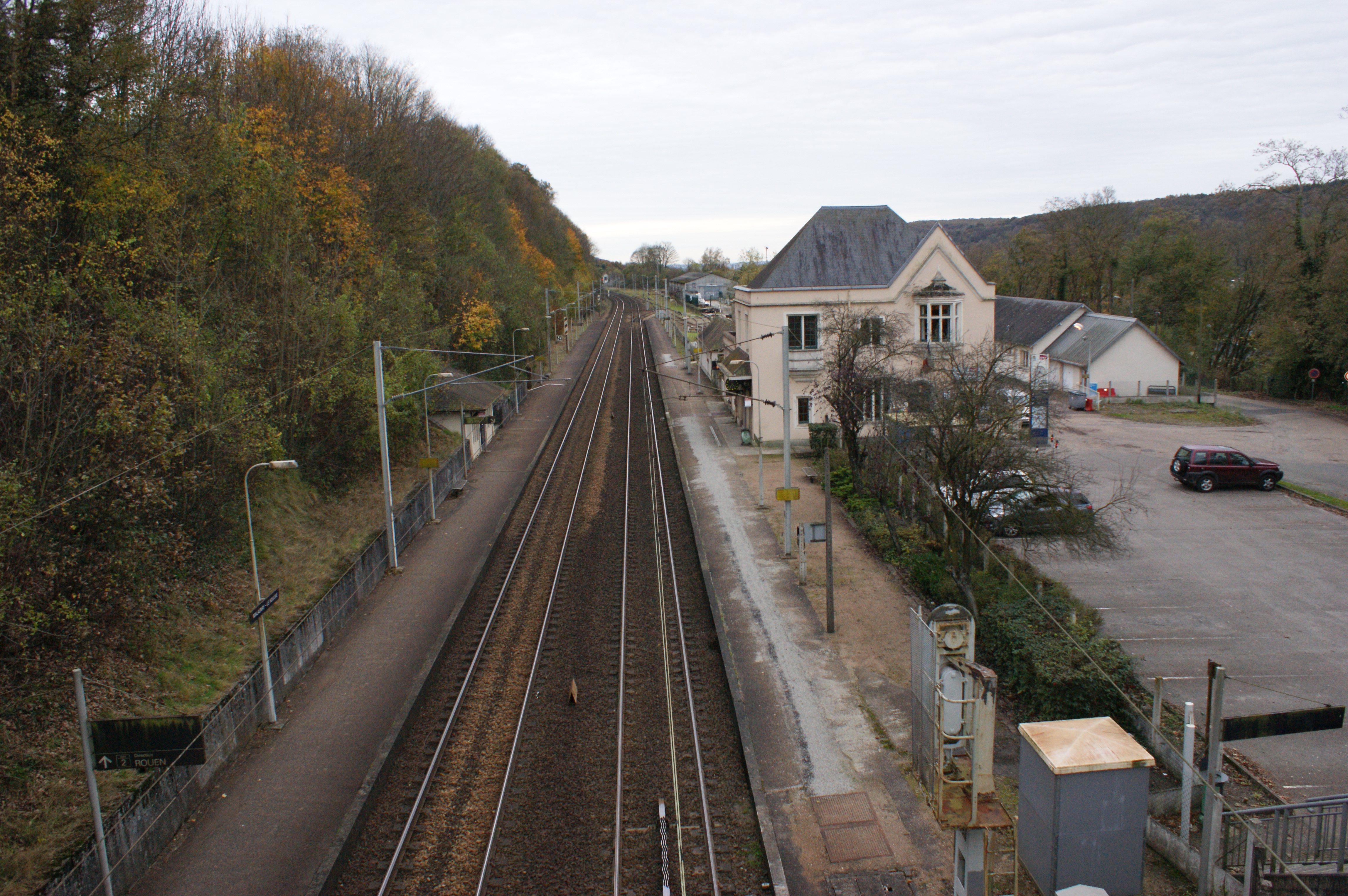 La gare de Malaunay - Le Houlme, la gare dans son ensemble vue depuis la passerelle.